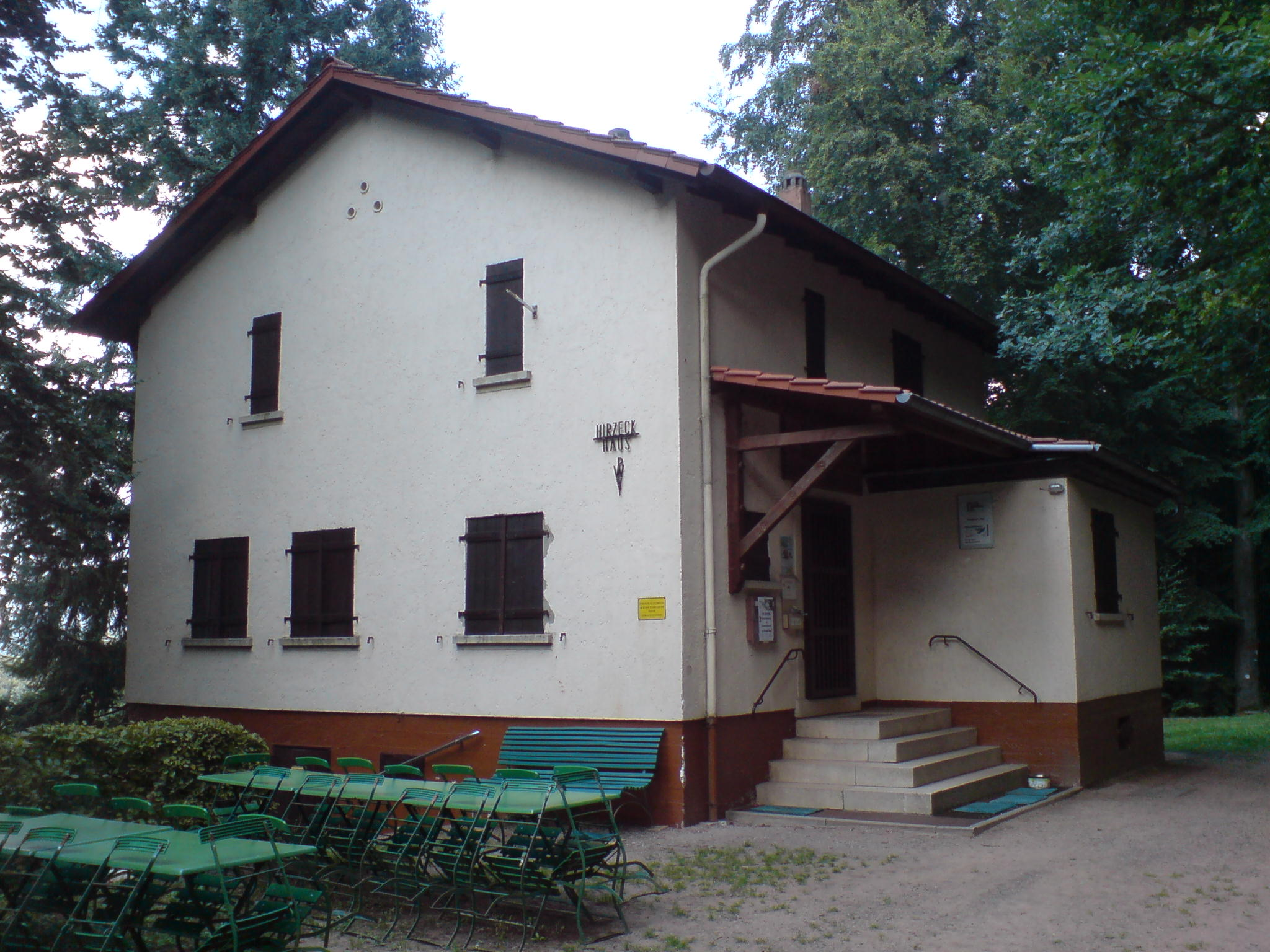 Das Hirzeck-Haus des PWV Bad Bergzabern bei Erlenbach.